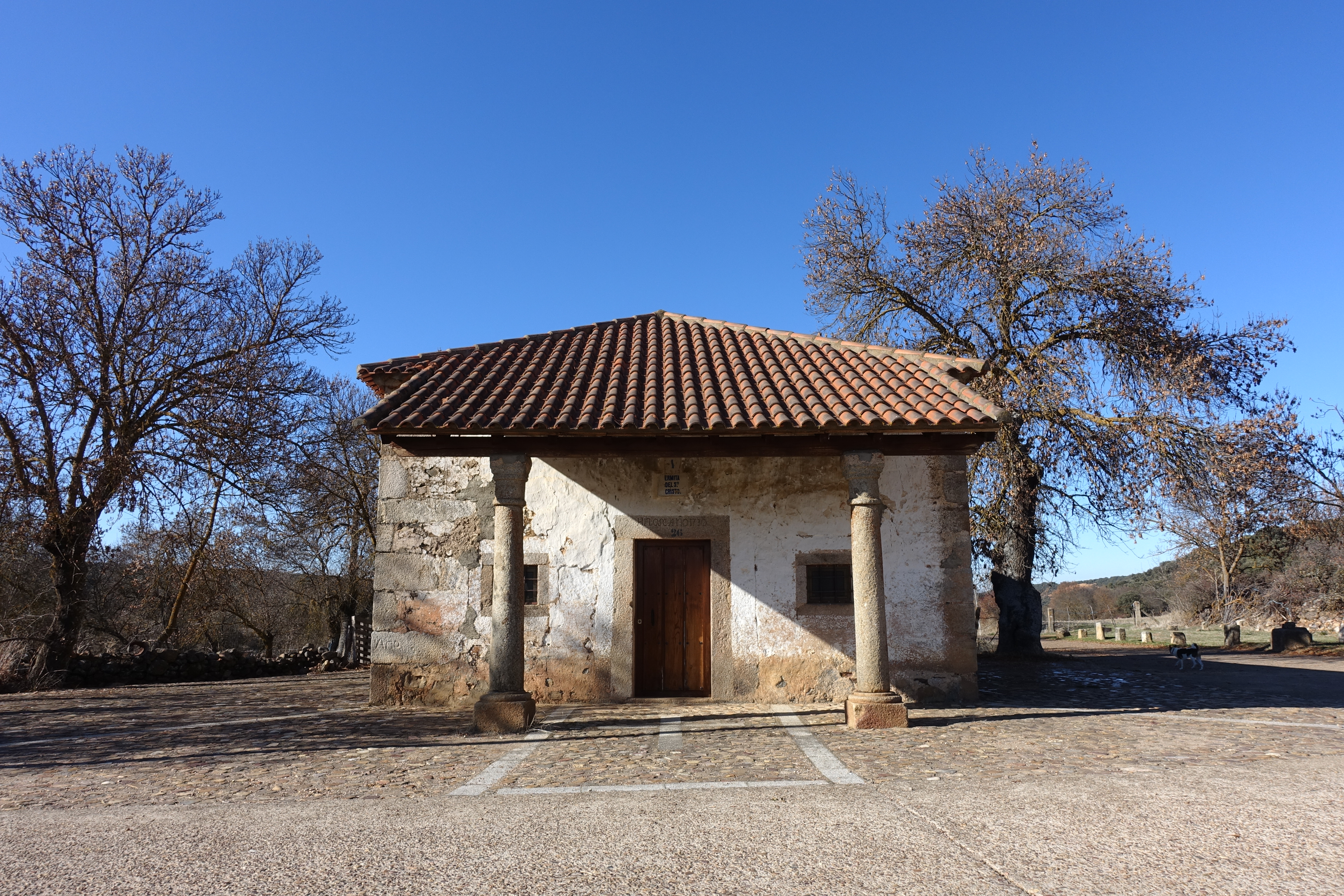 Ermita del Santo Cristo del Humilladero, Puebla de Yeltes (Salamanca, España).